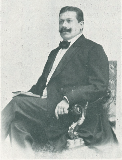 Josef Lauff c. 1903